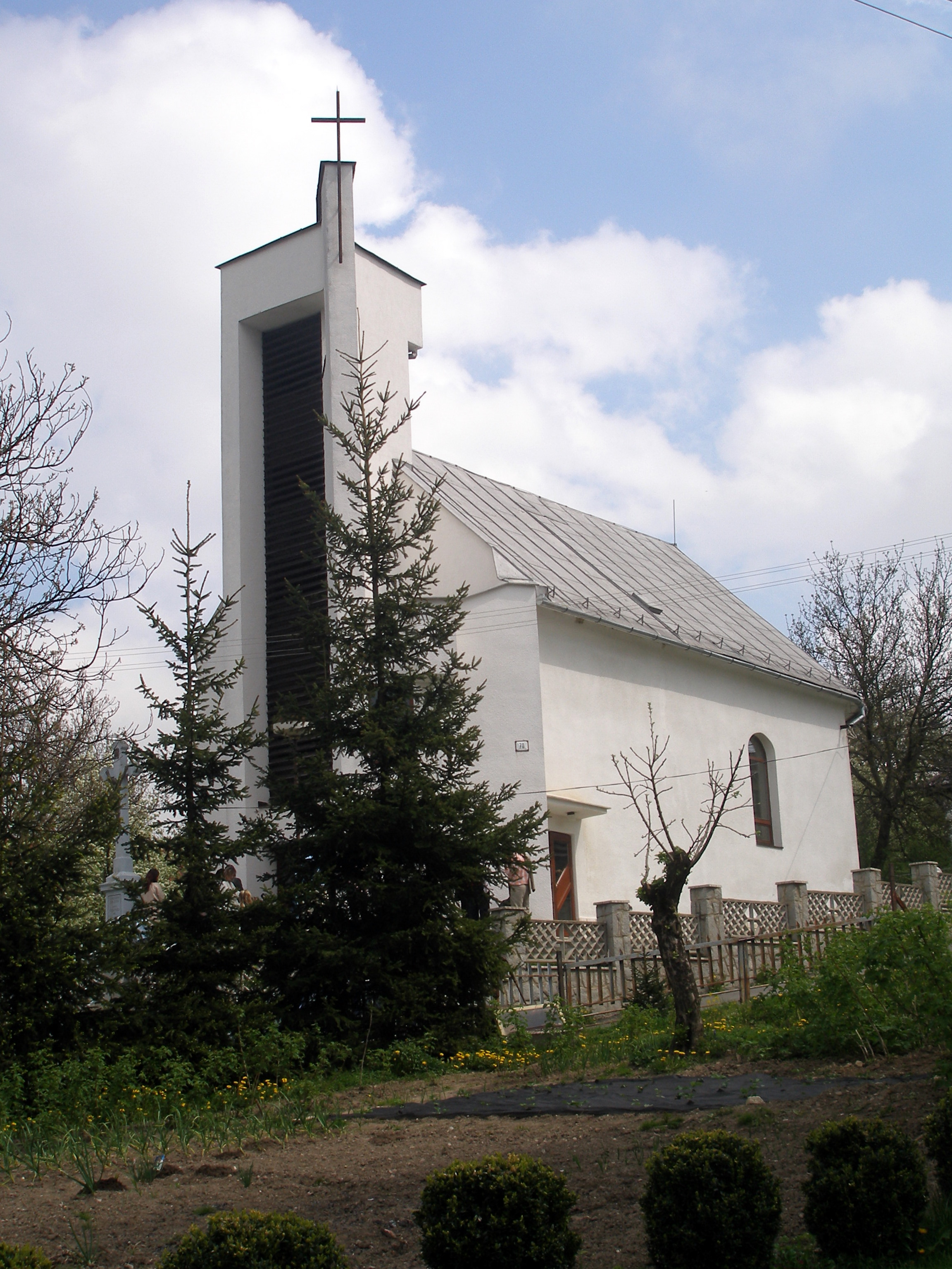 Obec Chmeľovec okres Prešov región Šariš